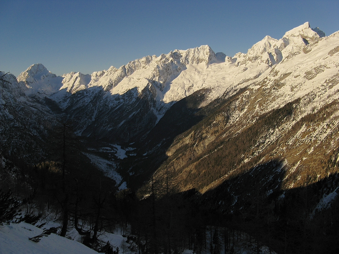 Bavški Grintavec, Pelci, Jalovec